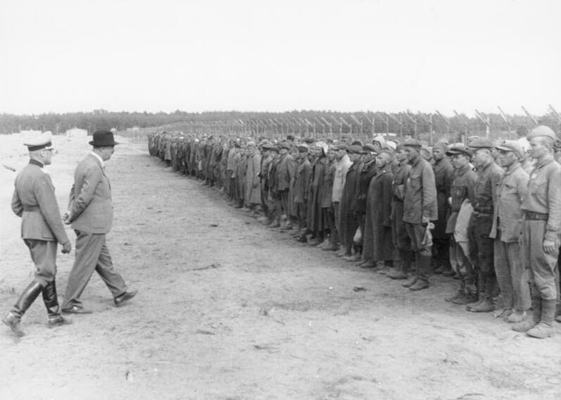 Delegation des Internationalen Roten Kreuzes unter Leitung von Prof. Carl Jacob Burckhardt besucht Stalag II B, Hammerstein 9.8.1941